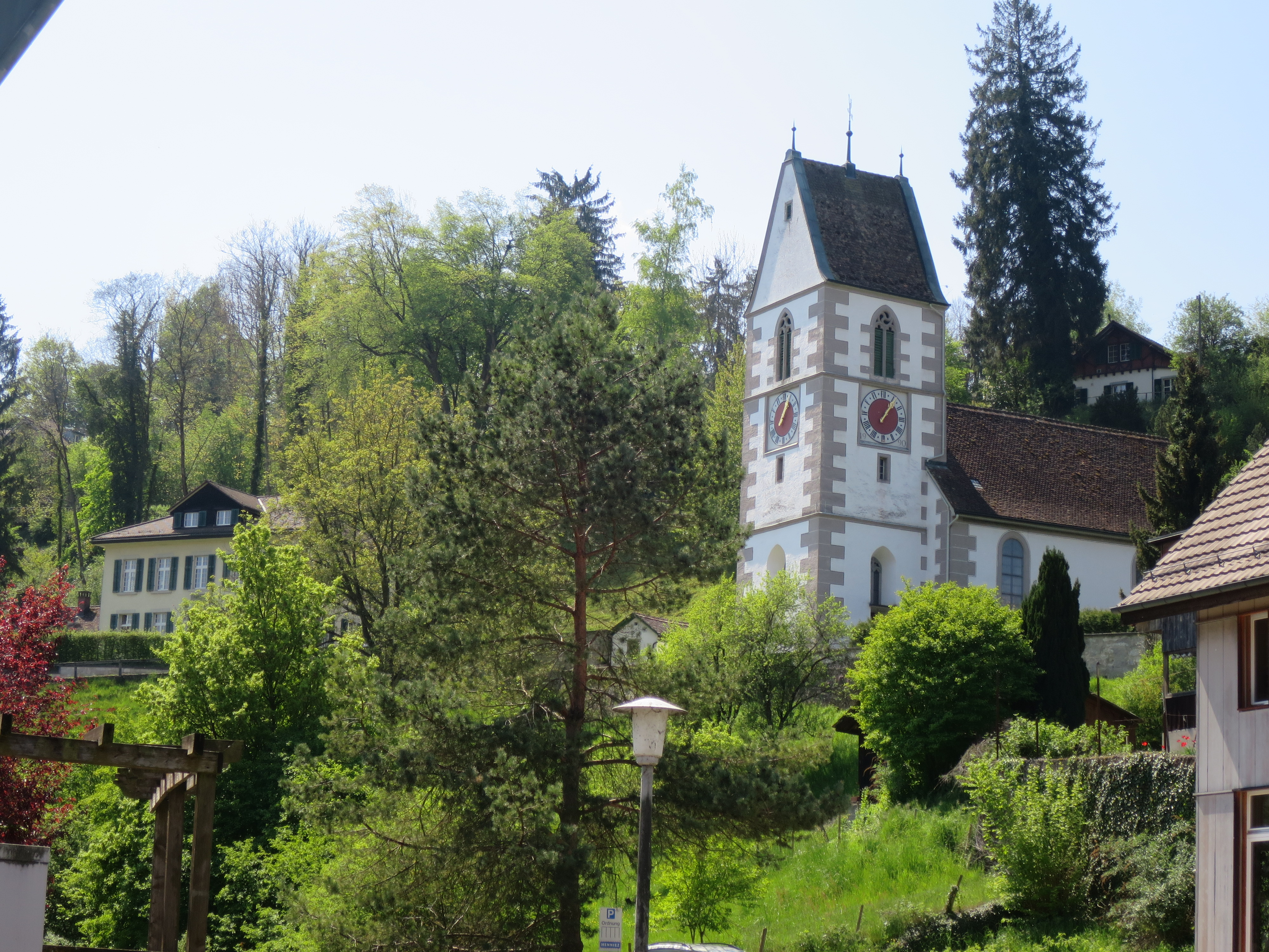 Ansicht der reformierten Kirche Rorbas